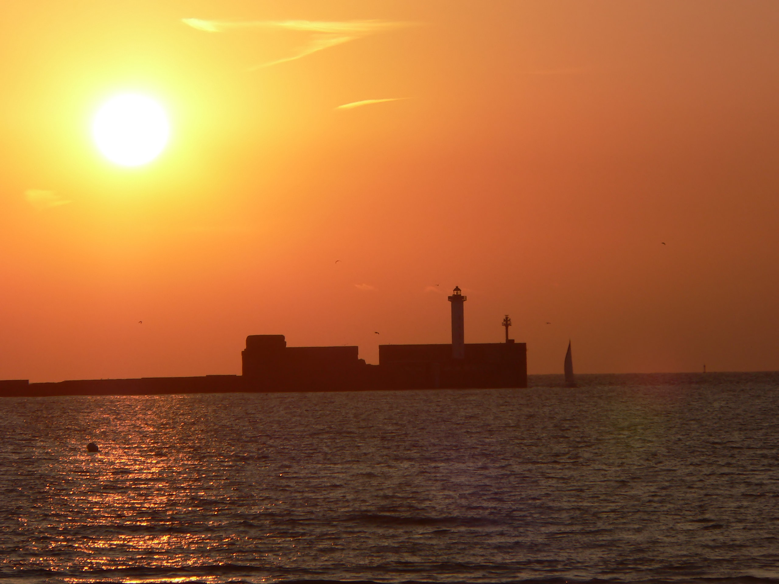 Le phare carnot de Boulogne sur mer